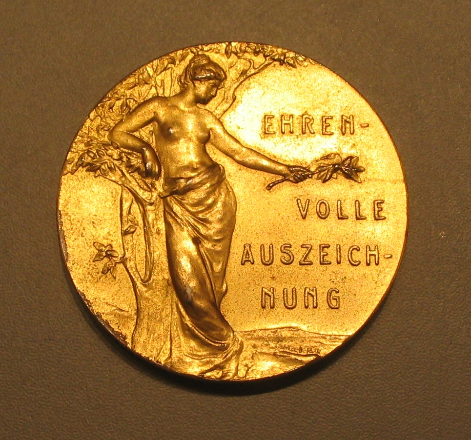 Medaille Verein Deutscher Kuerschner e. V.- Neuheiten-Ausstellung Leipzig. Die Neuheitenausstellung wurde erstmals 1882 veranstaltet.